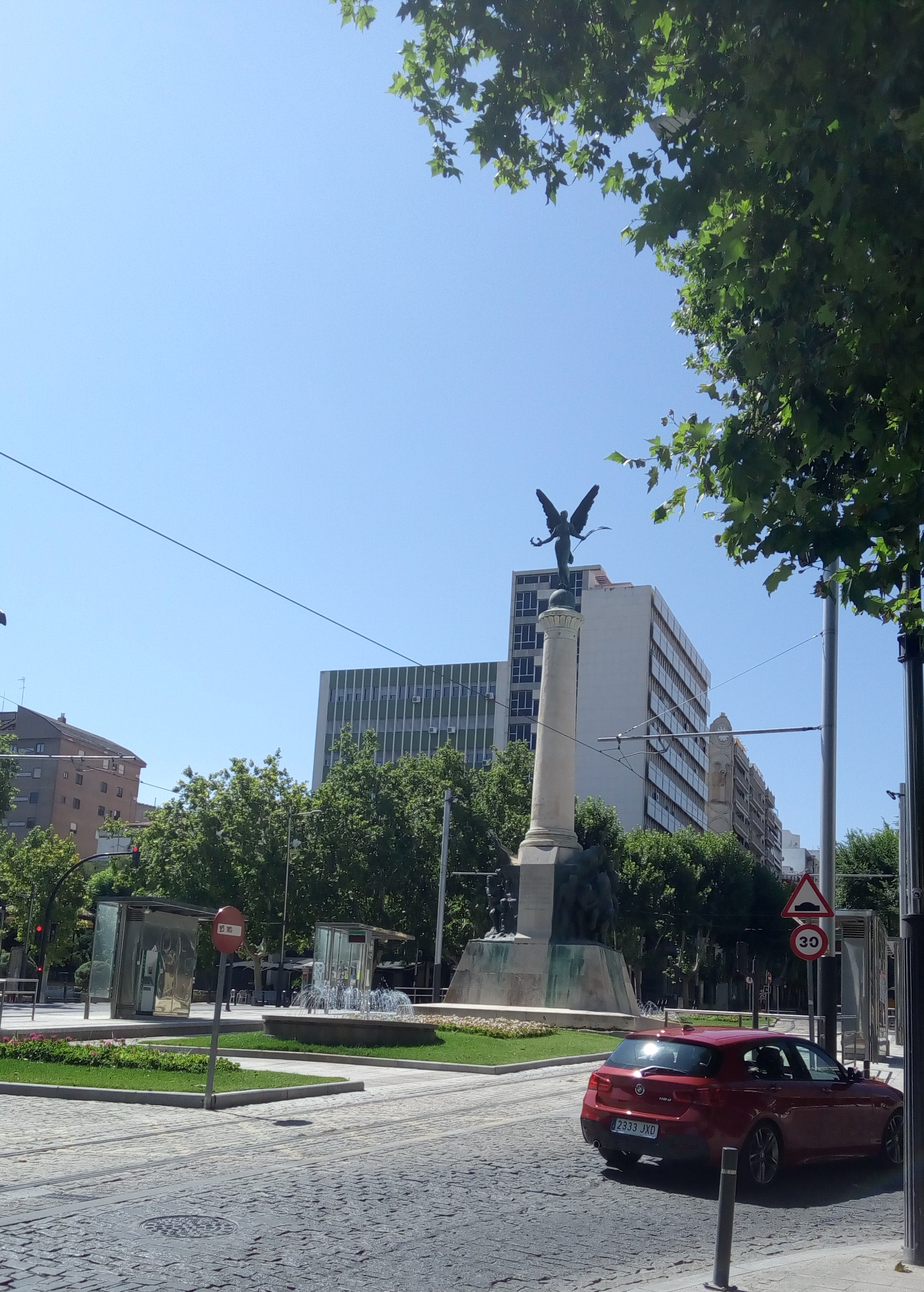 Монумент "Лас Батаяс"